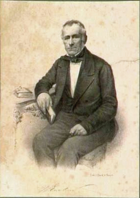 Portret van Willem Egeling (1791-1858), oprichter van de Nederlandsche Vereeniging tot Afschaffing van Sterken Drank